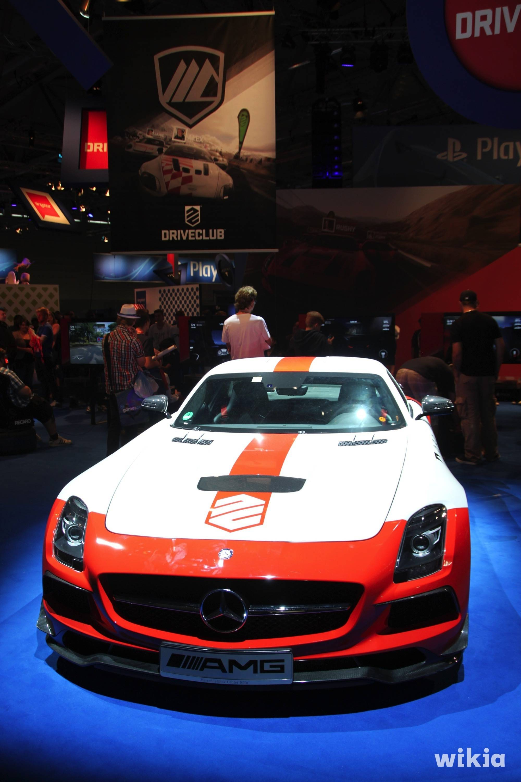 Impressionen: Letzer Tag, Sonntag. Mehr auf